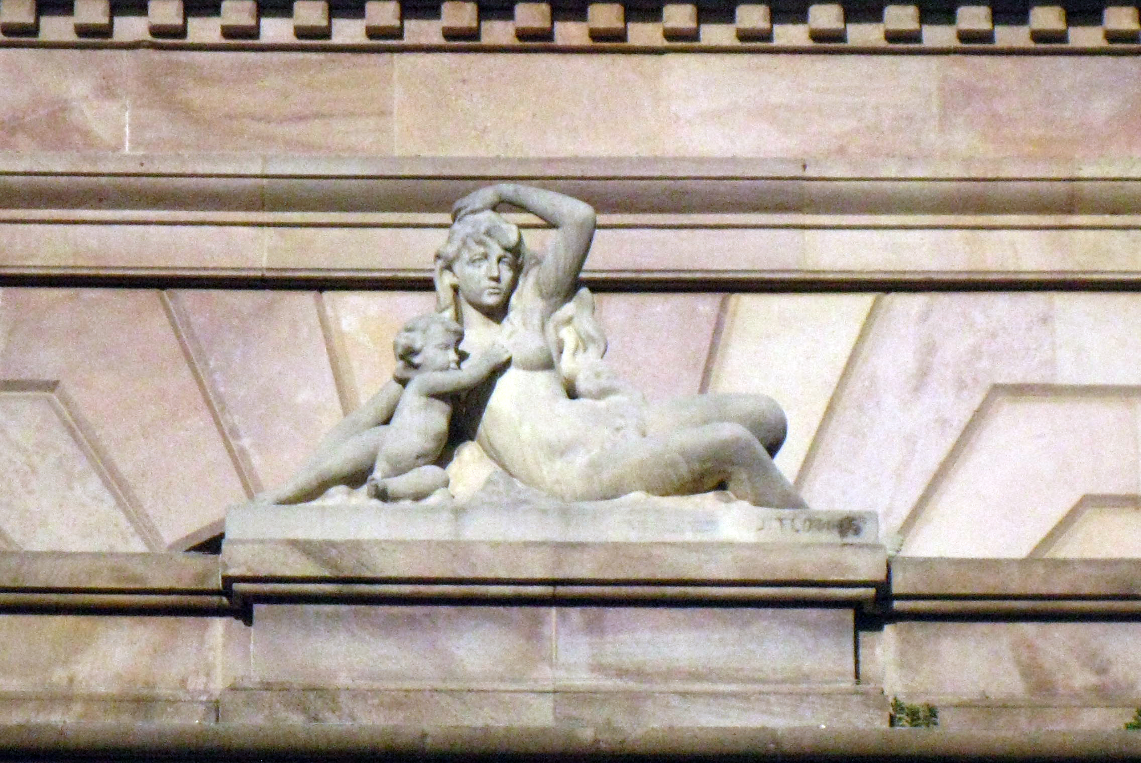 Dànae (Joan Flotats). Parc de la Ciutadella, Cascada (Barcelona)